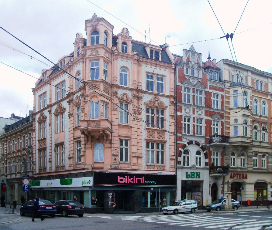 Zabytkowa narożna kamienica mieszczańska (ul. św. Jana 6, u zbiegu z ulicą Staromiejską 1), wpisana została do rejestru zabytków z nr rej. 1393/89 z 23 października 1989, wzniesiona na początku XX wieku w stylu eklektyzmu, łączącego elementy neorenesansu, neogotyku i neobaroku. Obecnie siedziba salonów Plus i Bikini.